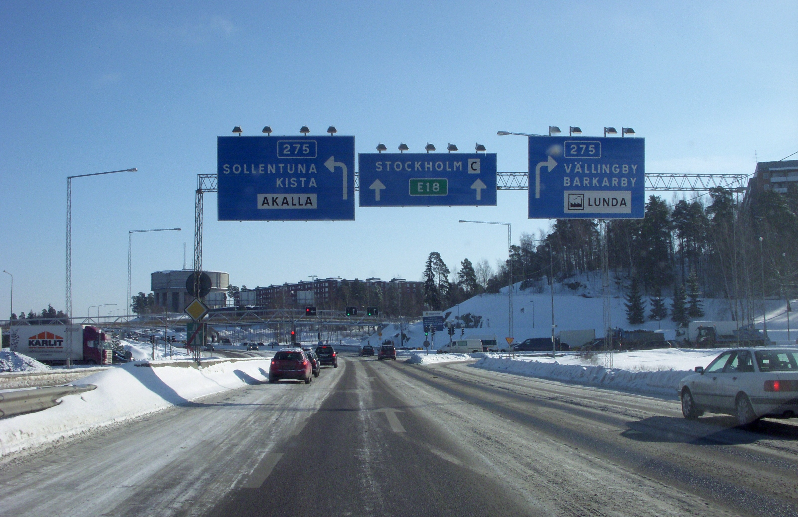 Lunda industriområdet, Hjulstamotet, E 18 mot Stockholm